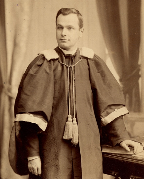 Michel-Thomas Labreque